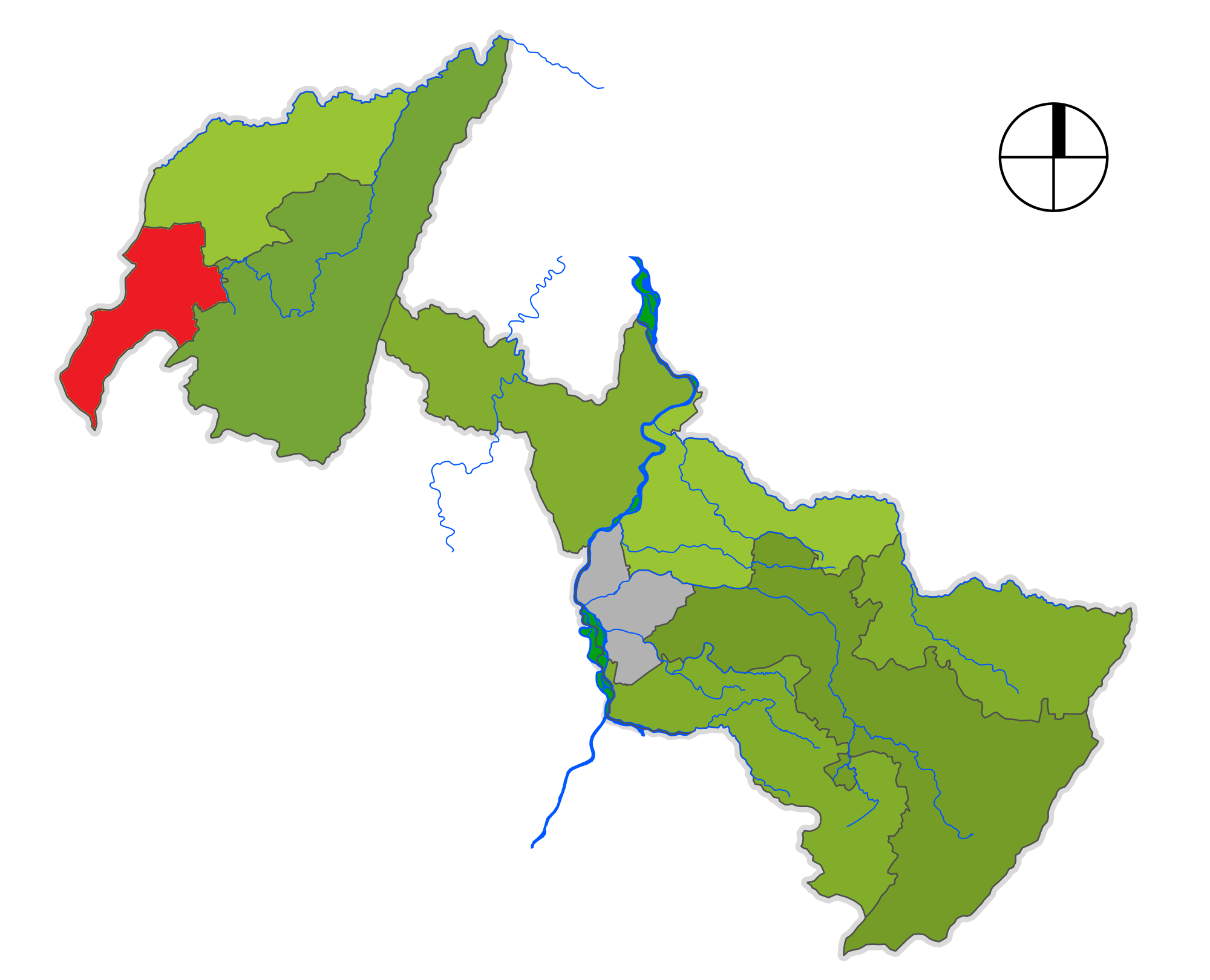 Corregimiento de Neiva Aipecito, departamento del Huila, Colombia.